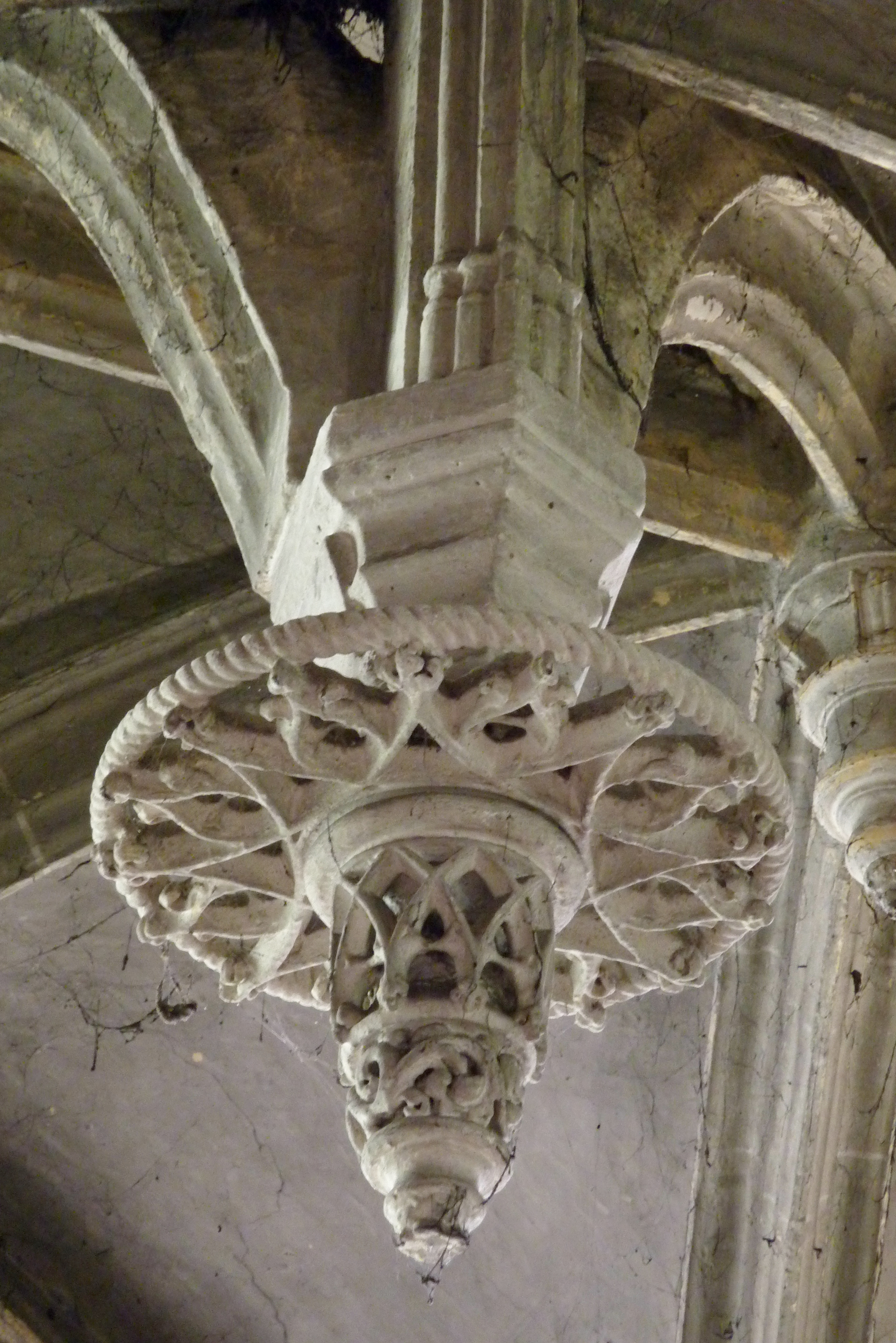 Katholische Pfarrkirche Saint-Jean-Baptiste in Nemours im Département Seine-et-Marne in der Region Île-de-France (Frankreich), Schlussstein (Abhängling)